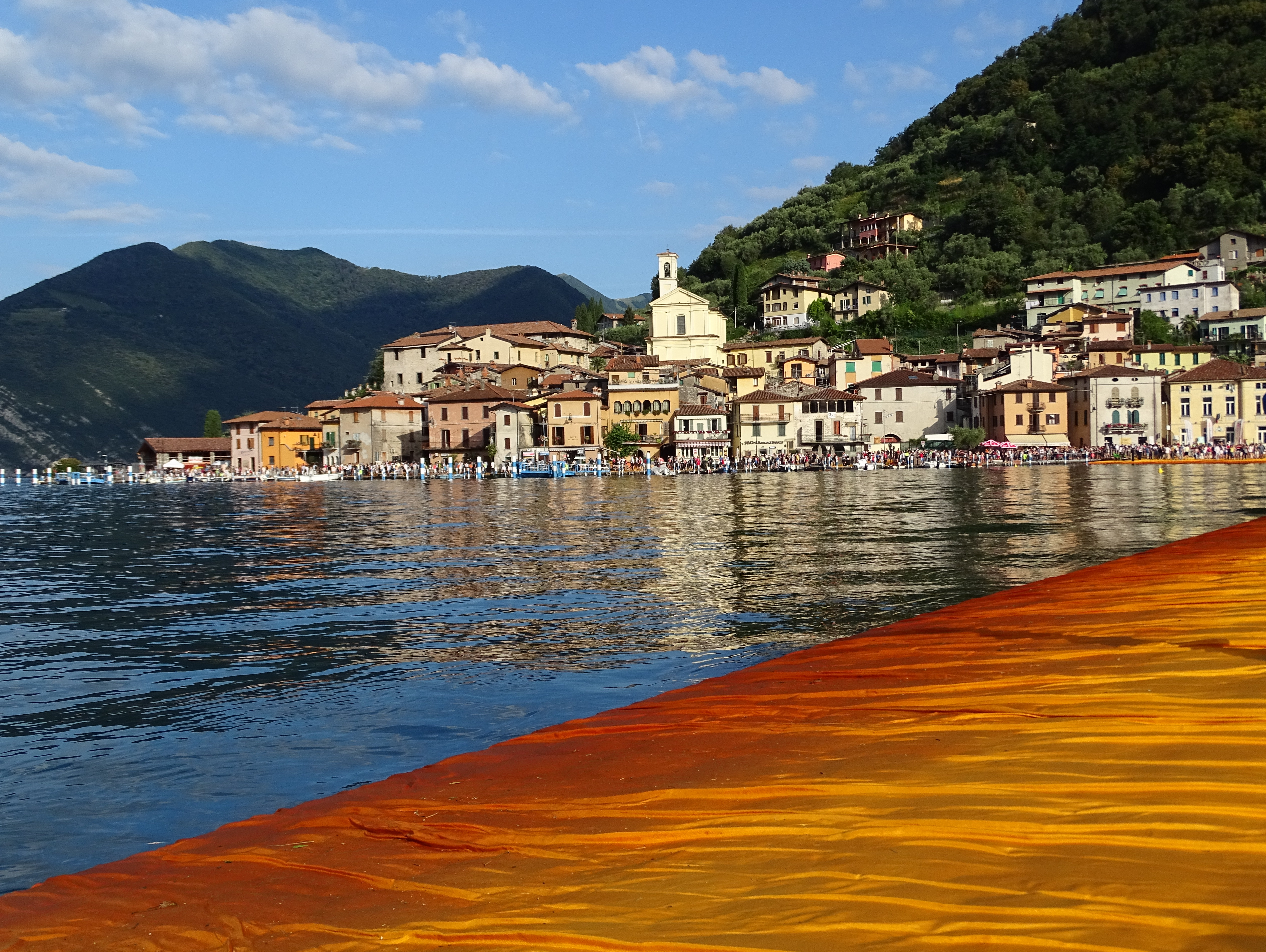 Lago d'Iseo, The Floating Piers, Christo, 2016, Gemeinde Peschiera Maraglio